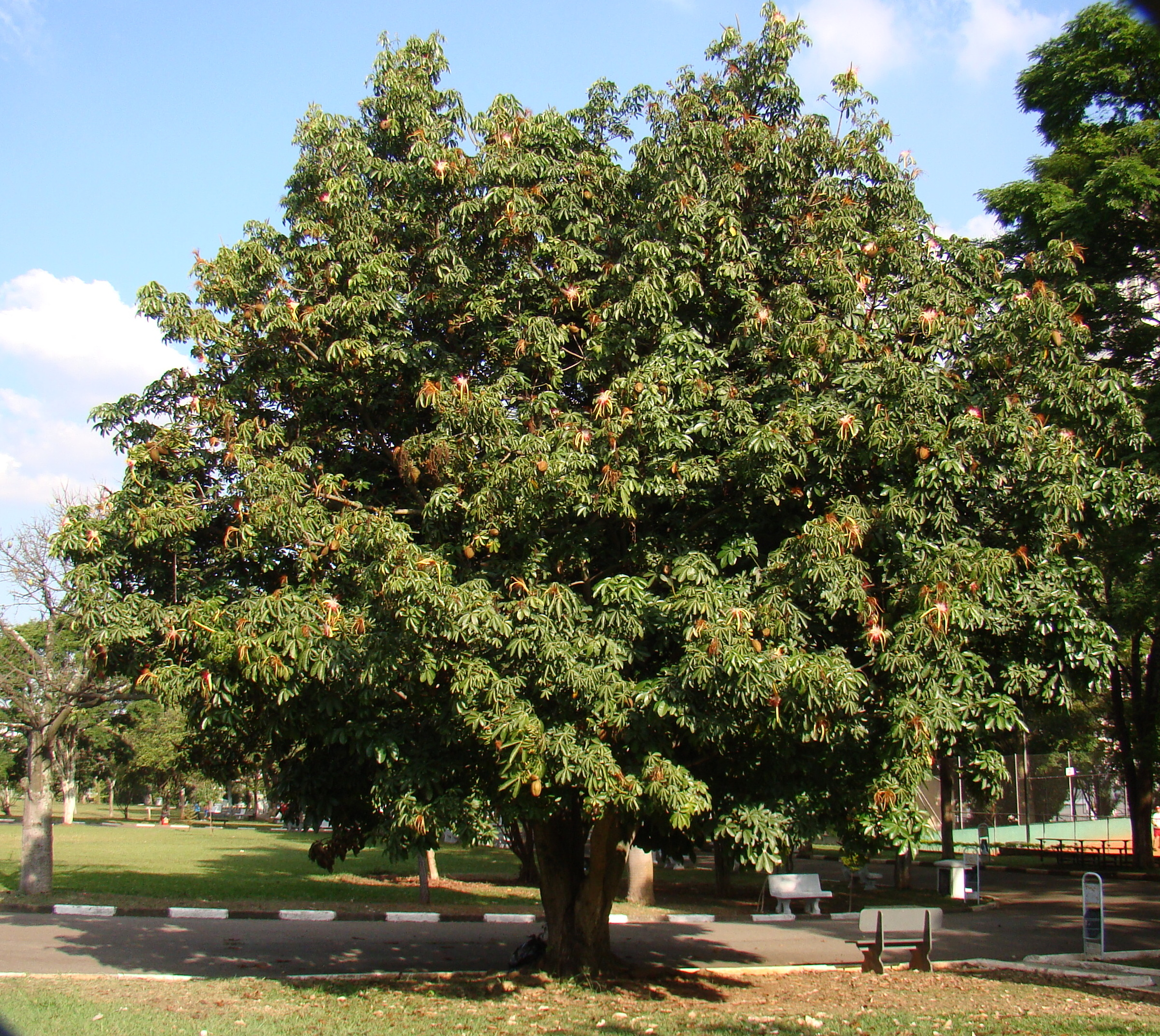 Munguba (Pachira aquatica) Ceret Sao Paulo. Brazilian native tree